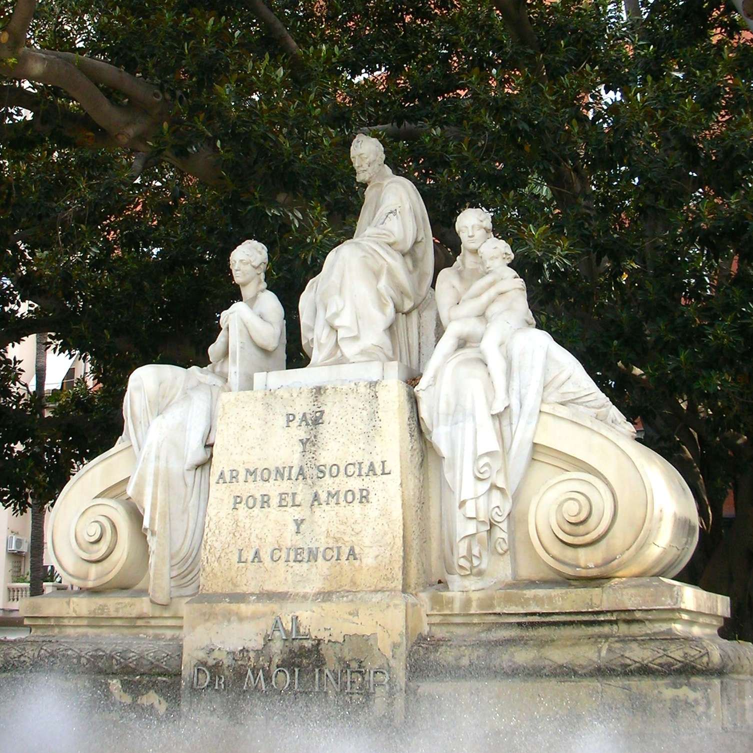 Monument al doctor Francisco Moliner Nicolás (1851-1915) en el passeig de l'Albereda, València, esculpit en marbre de Carrara per José Capuz (1884-1964).